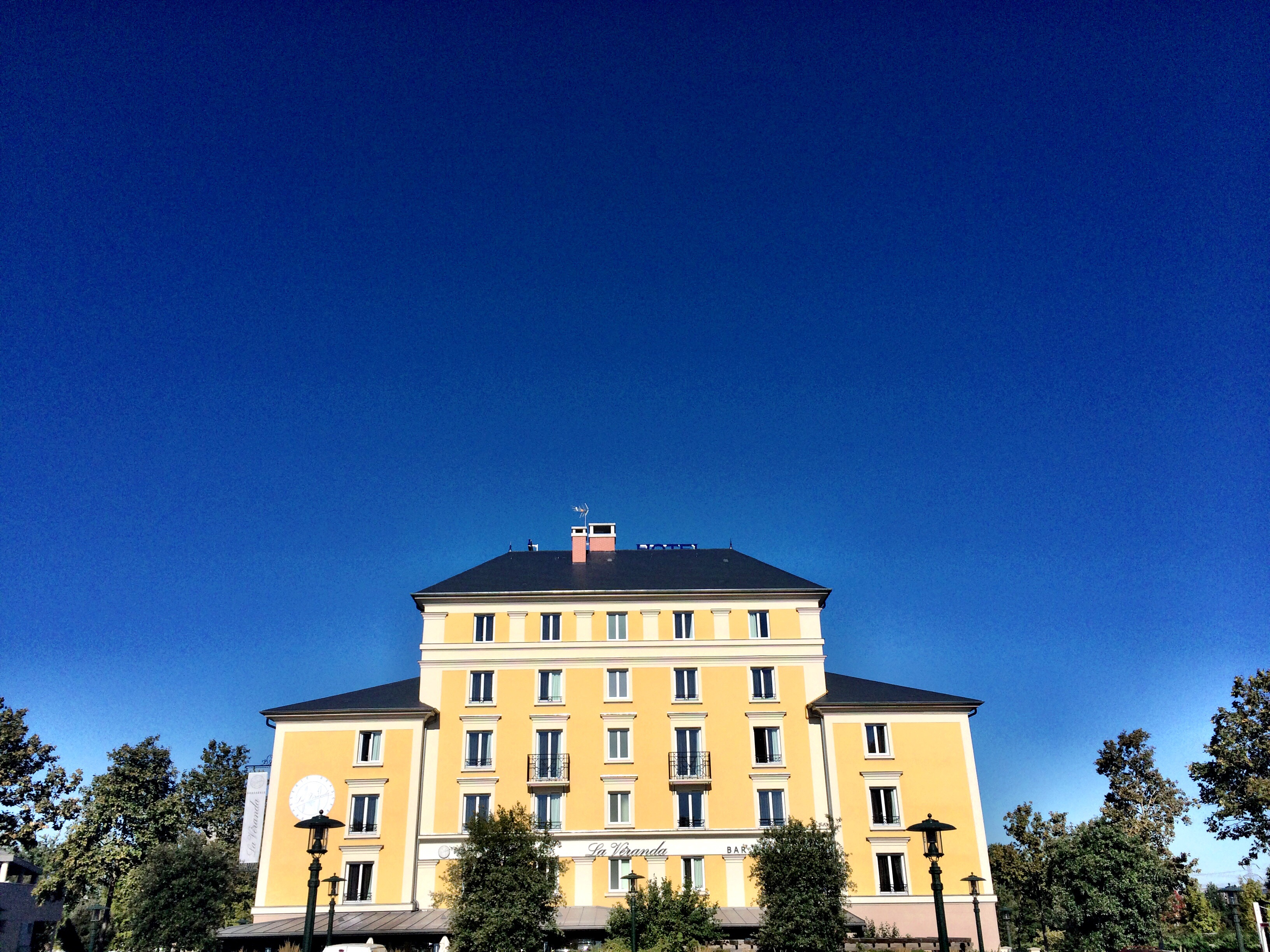 Hôtel face au pôle culturel du Plessis-Robinson